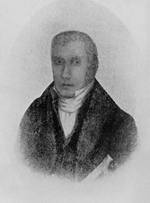 Vermont Senator James Fisk, from [1]